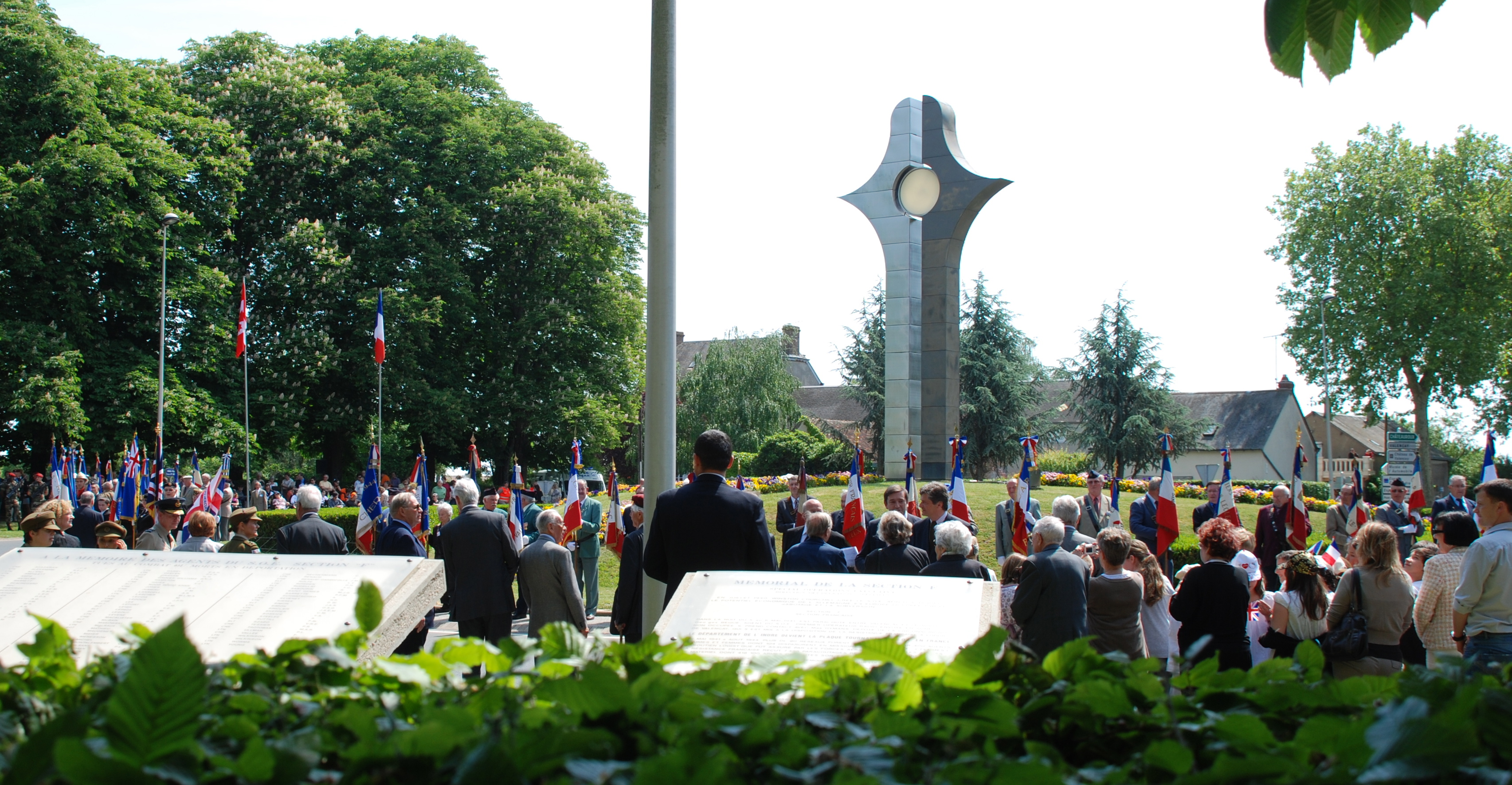 Mémorial de Valençay - Hommage aux 104 agents de la section F - 6 juin 2011